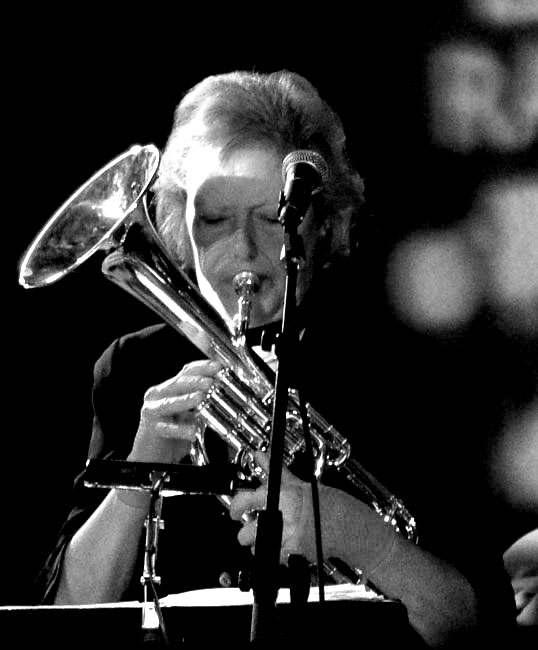 Kate Westbrook, Mike Westbrook's Village Band, Queen Elisabeth Hall, 10 November 2006